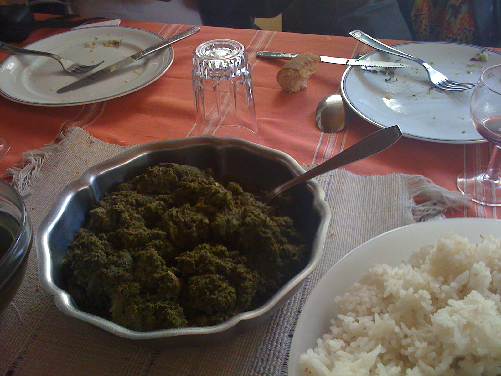 Ravitoto accompagné de riz